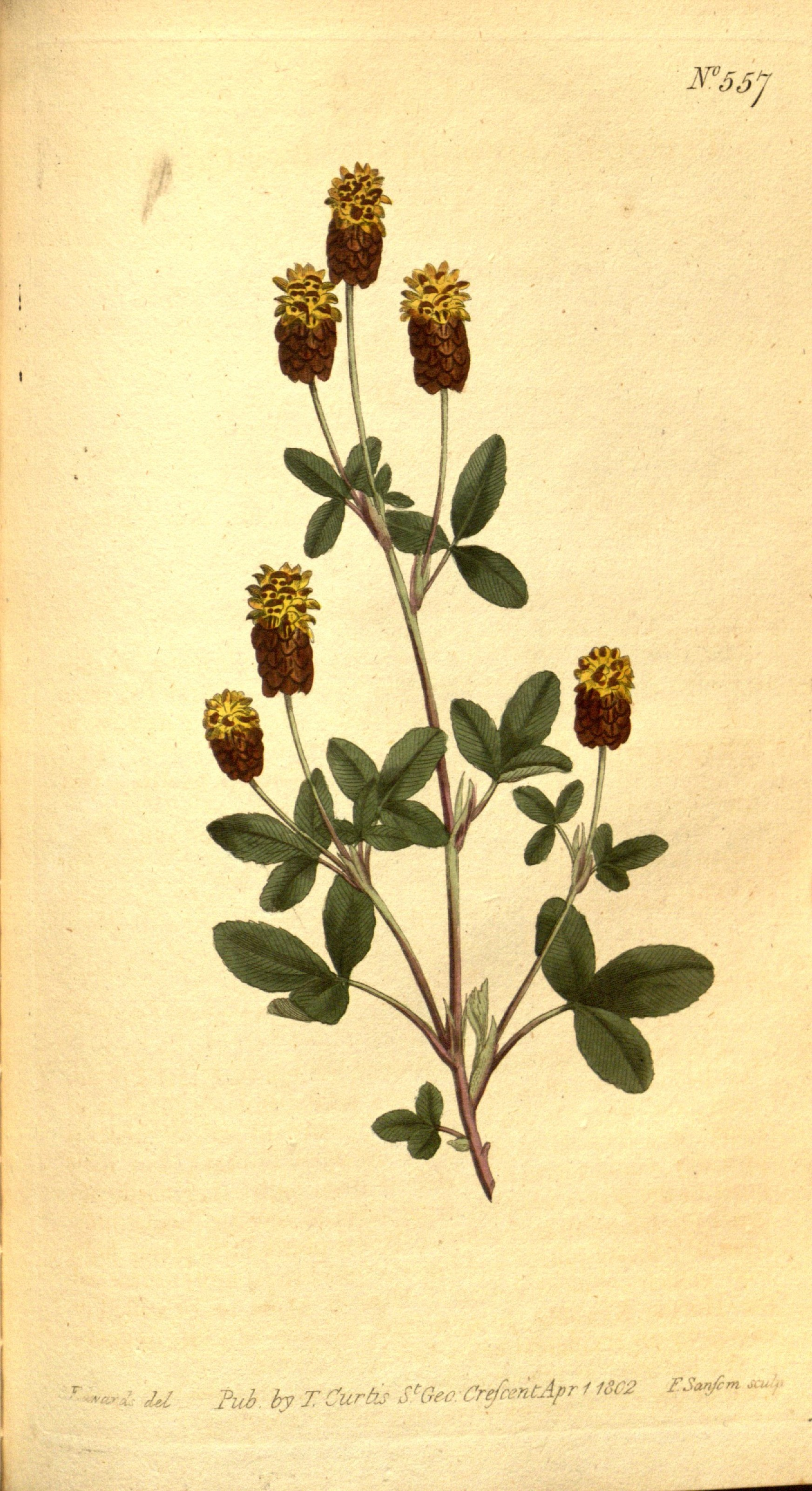 IFoSj I